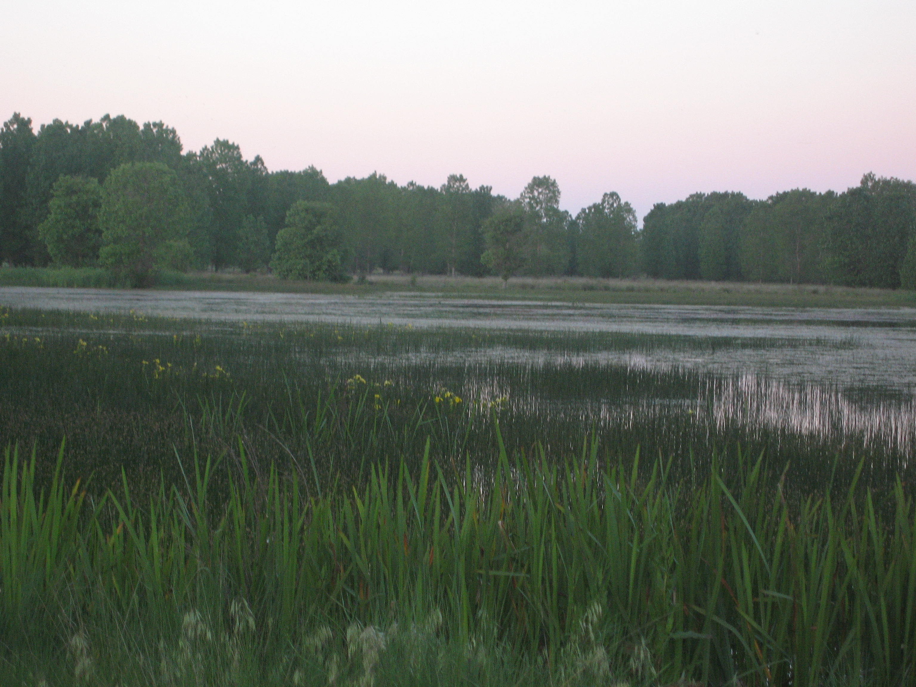 Vista del Espadañal, Cuéllar, Segovia, España